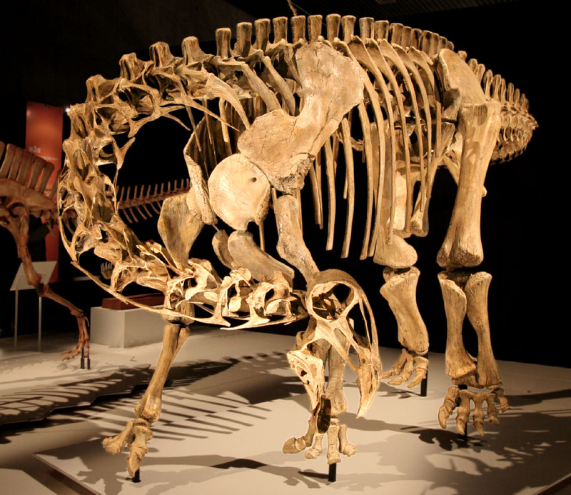 Nigersaurus - 01